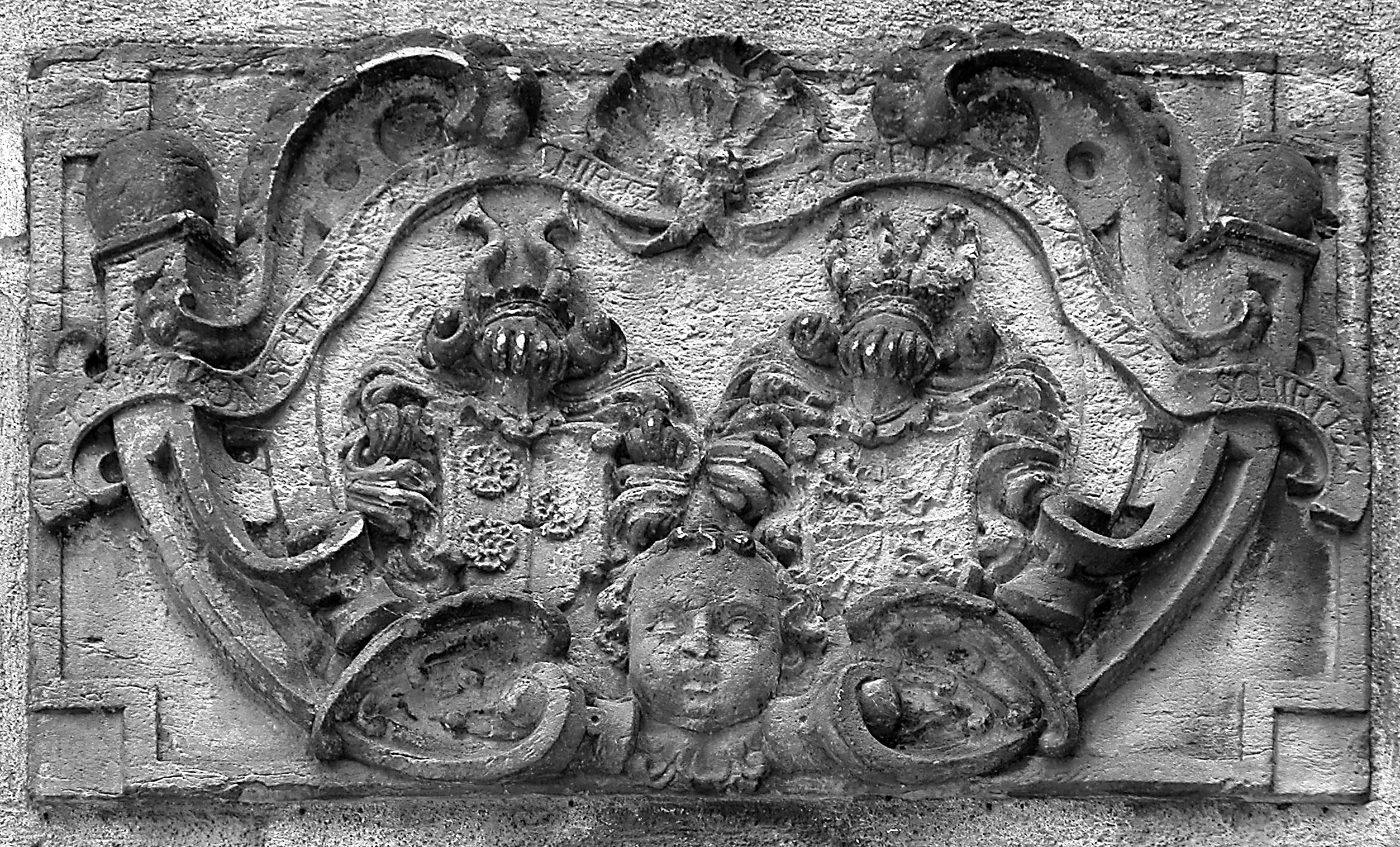 17.07.2003 01665 Schieritz (Diera-Zehren): Schloßareal. Wappen am Inspektorenhaus, Joachim von Schleinitz auf Schieritz und Gemahlin Margretha?. [DSCN1436...1438]20030717600JPG(c)Blobelt